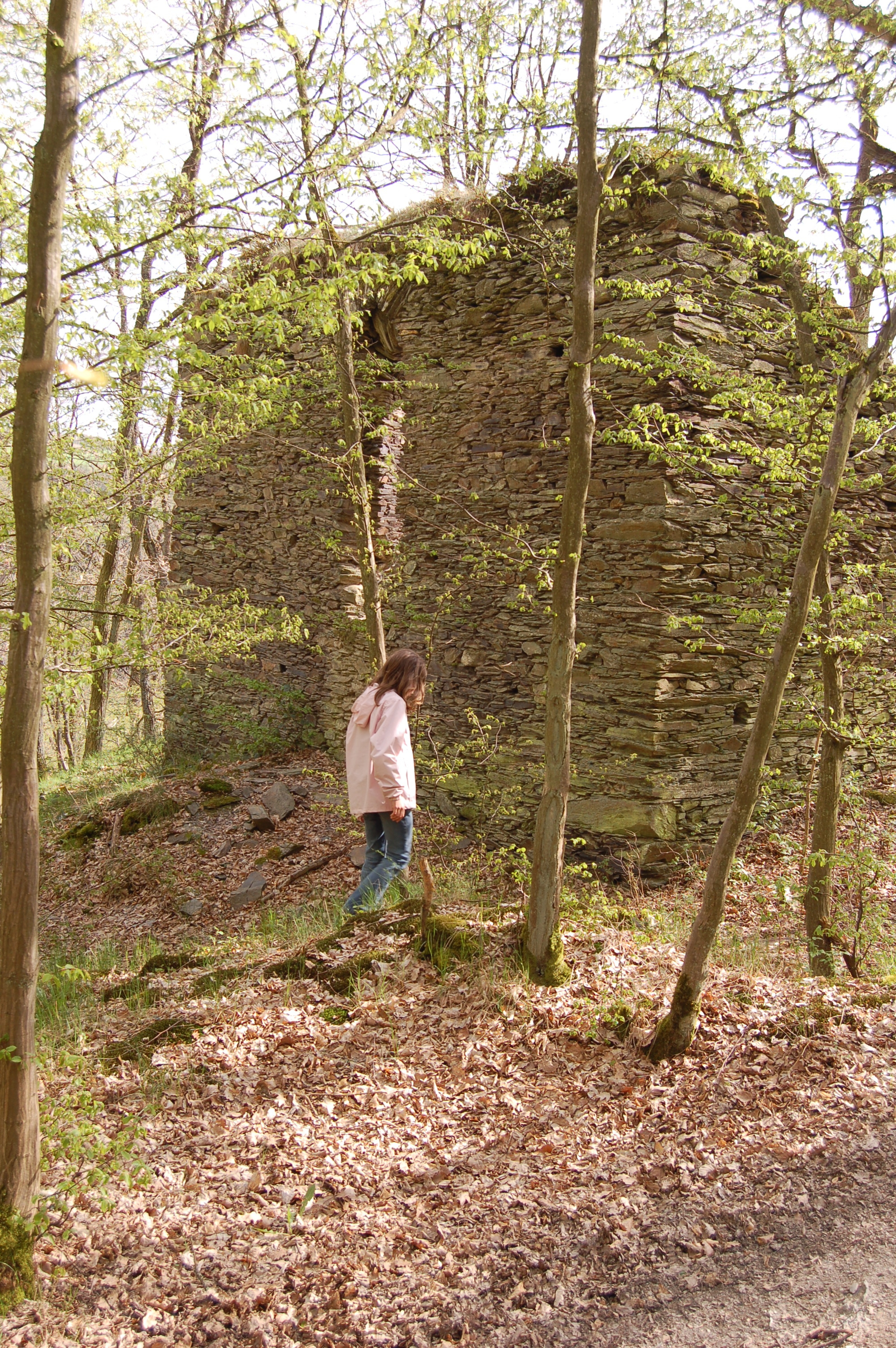 Woppenroth Hellkirch außen